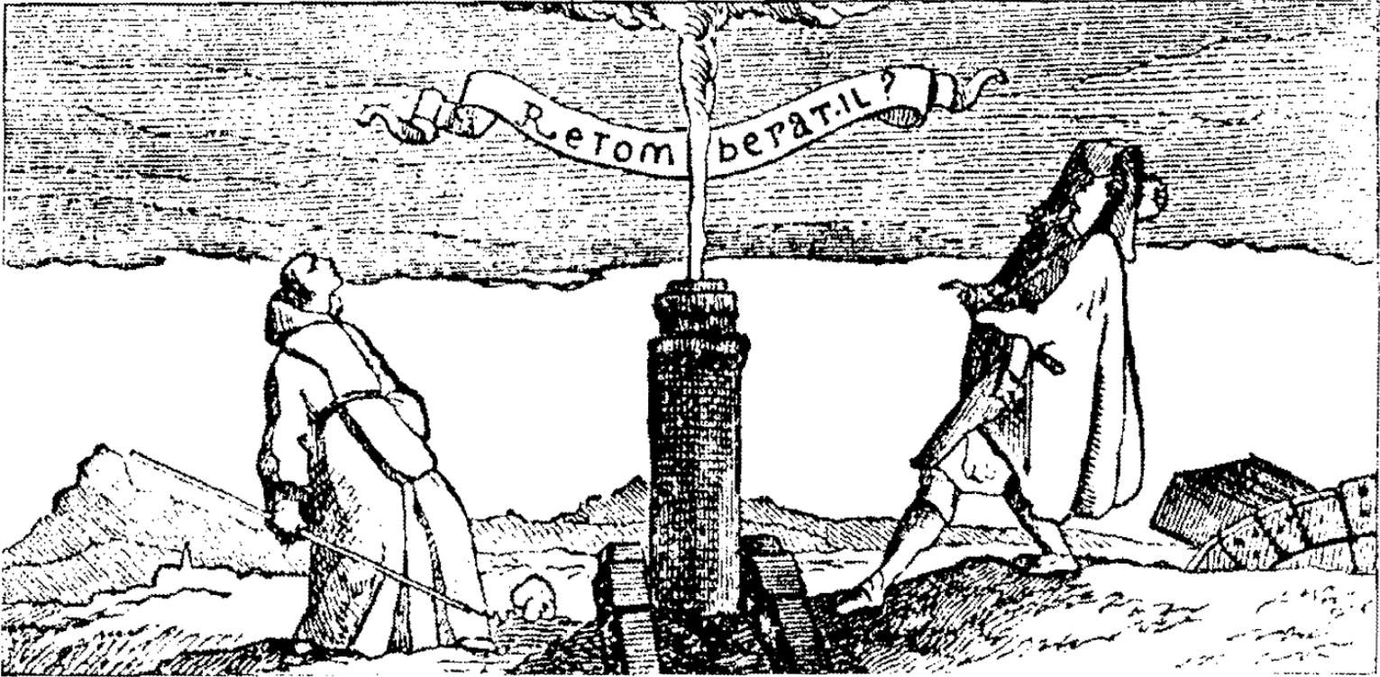 マラン・メルセンヌによる砲弾打ち上げ実験